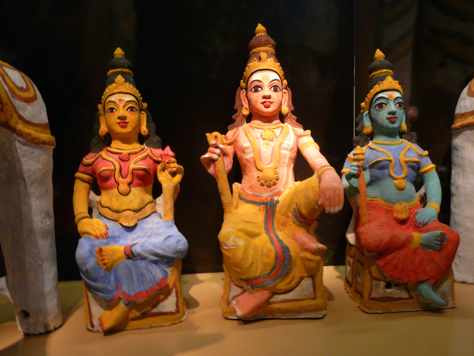 Aiyanar-Paarden (R-504) Onderdeel van Aiyanar paarden Female figures, part of a group of Aiyanar horses and figures at the Tropenmuseum in Amsterdam terracotta Aiyanar is a Hindu village god that is especially worshipped in Tamil Nadu in South India and in Tamil villages in Sri Lanka. Aiyanar is een Hindu dorpsgod die vooral in de zuidelijke deelstaat Tamil Nadu en in Tamil dorpen in Sri Lanka wordt vereerd in clan verband. Hij is dorpswachter die dorpen beschermt. Een Aiyanar tempel is te herkennen aan de rij terracotta paarden die bij de ingang van de tempel staan. Aiyanar verering is verbonden met de verering van de natuur en vruchtbaarheid. Anders dan bij andere Hindu goden vereringen zijn de Aiyanar priesters geen Brahmanen en iedereen wordt geaccepteerd. Foto gemaakt tijdens Wiki Loves Art Nederland workshop in het Tropenmuseum in Amsterdam op 26 juni 2009. Photo taken at Wiki Loves Art Netherlands workshop in the Tropenmuseum in Amsterdam on 26 June 2009.